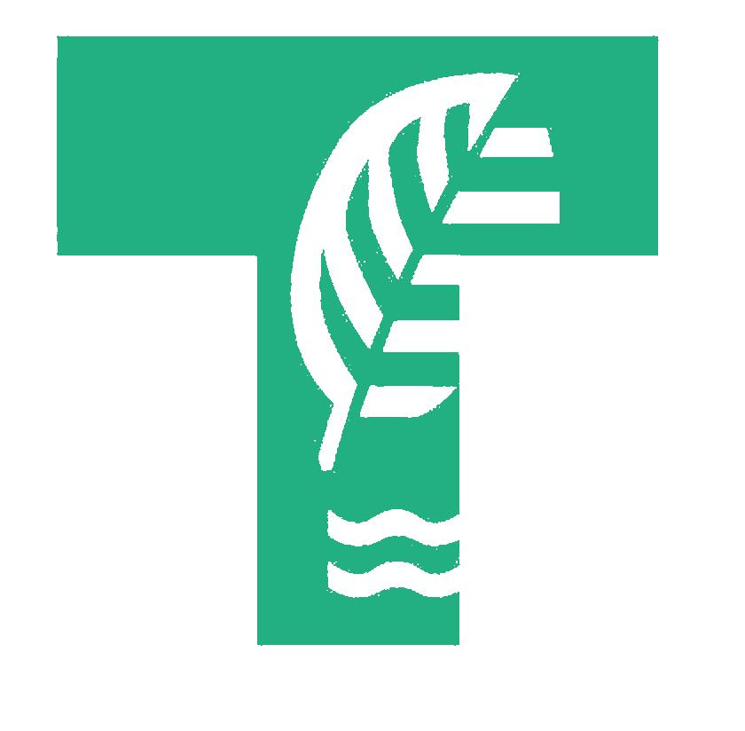 Logo de Torcy dessiné par moi-même